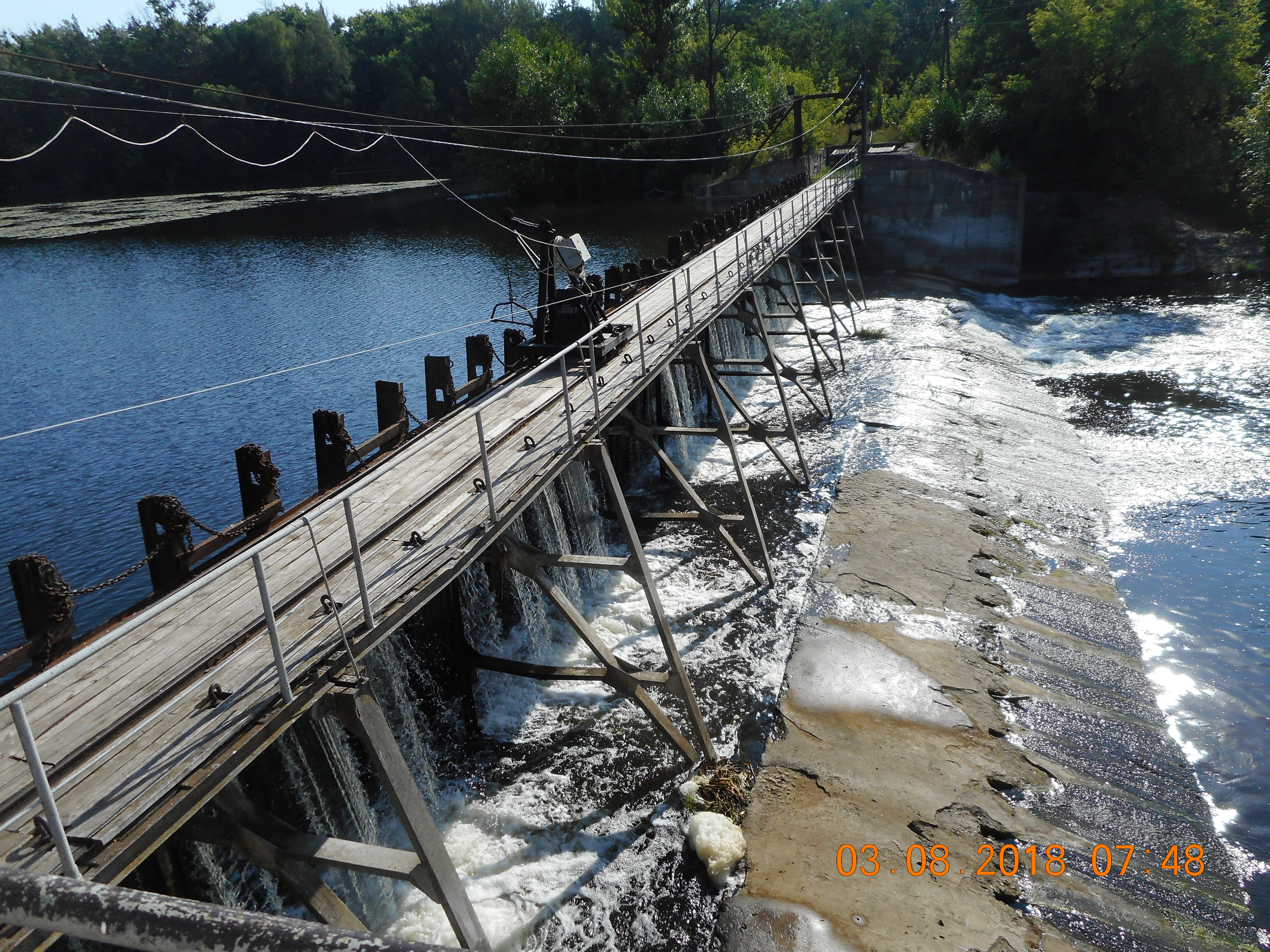 Гребля ГЕС